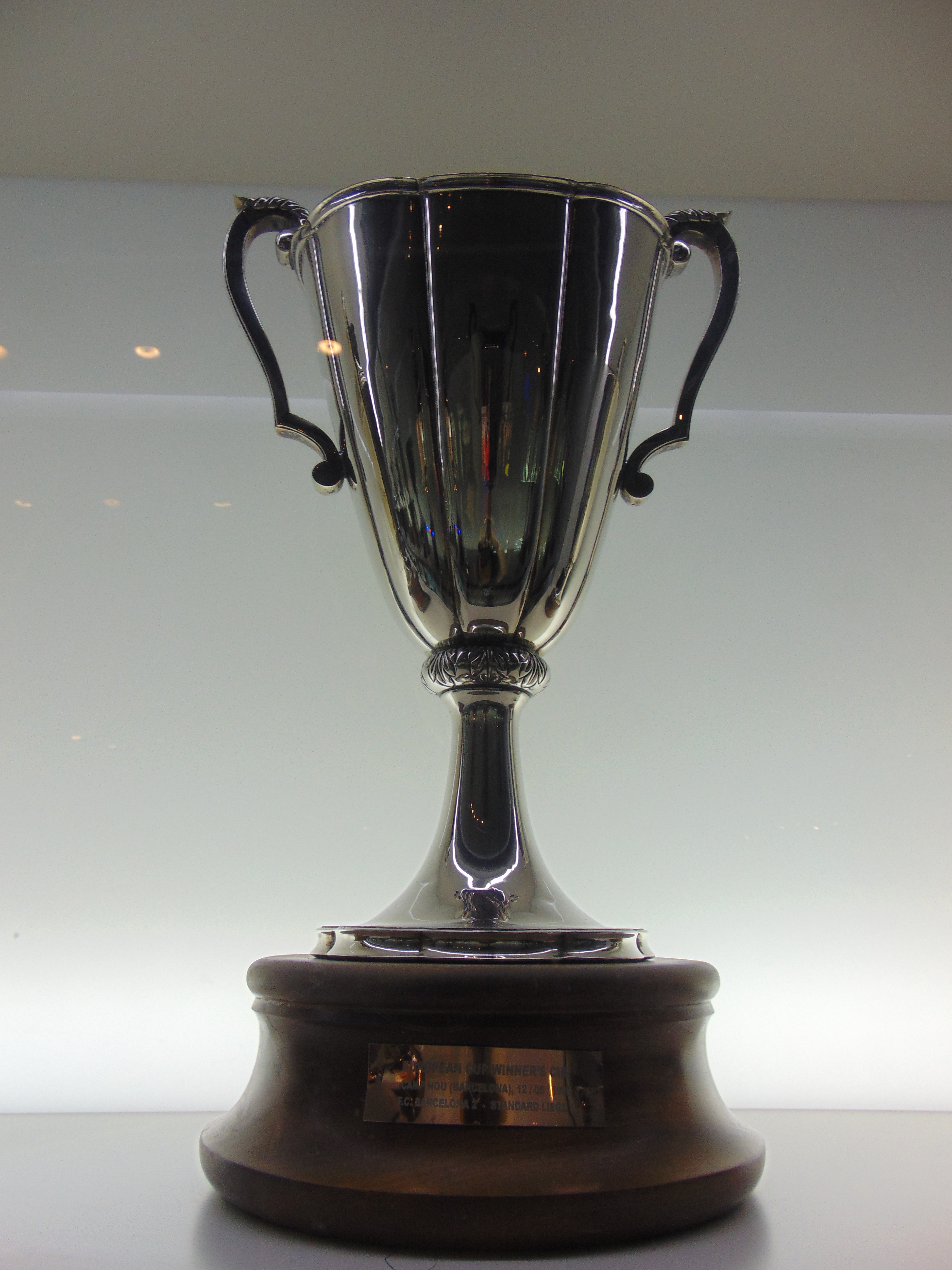 Col·leccions del Museu del FC Barcelona UEFA Cup Winners' Cup